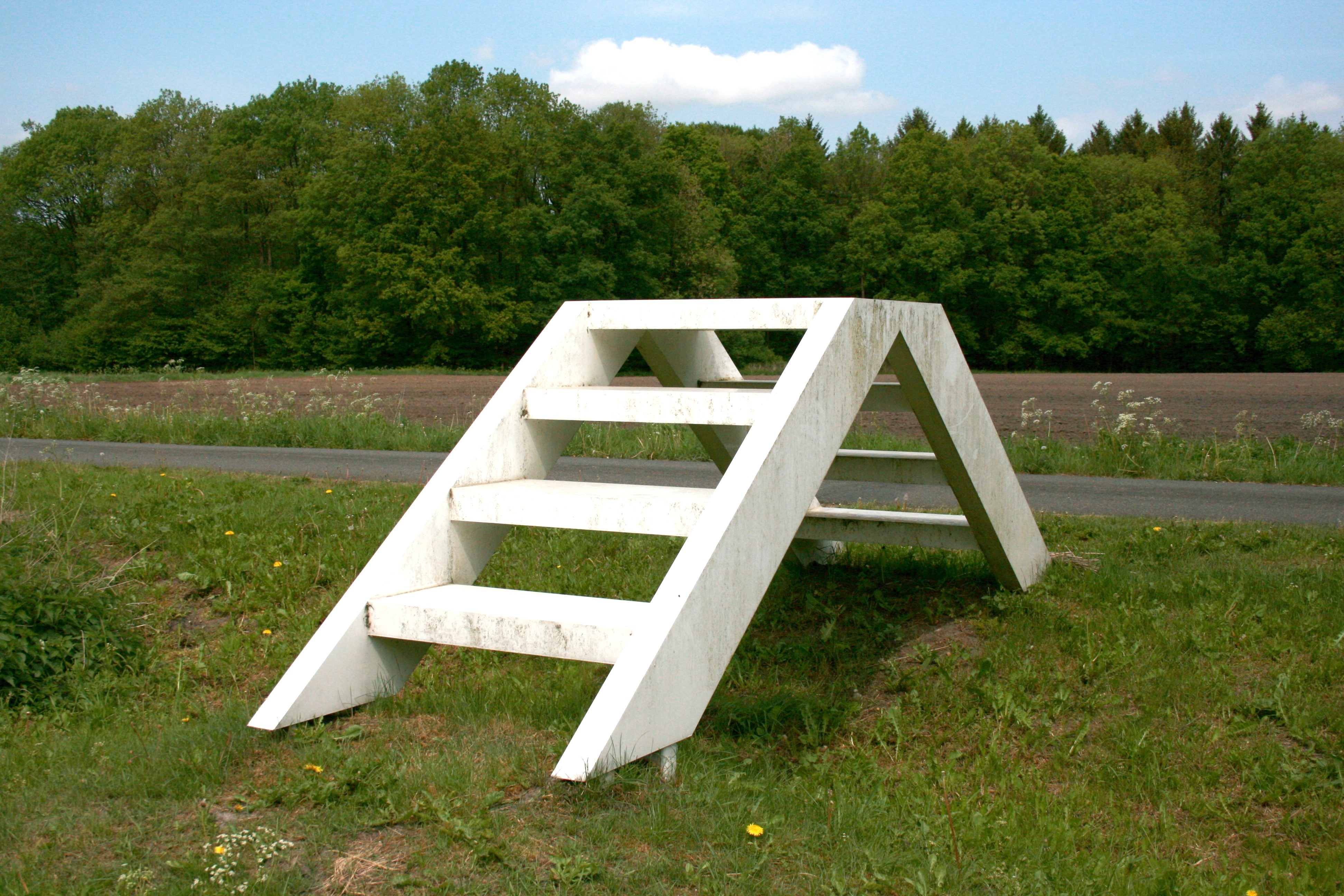 „Treppe“, Skulptur von Stefan Kern im Projekt Kunst-Landschaft des Kunstvereins Springhornhof in Neuenkirchen (Lüneburger Heide)